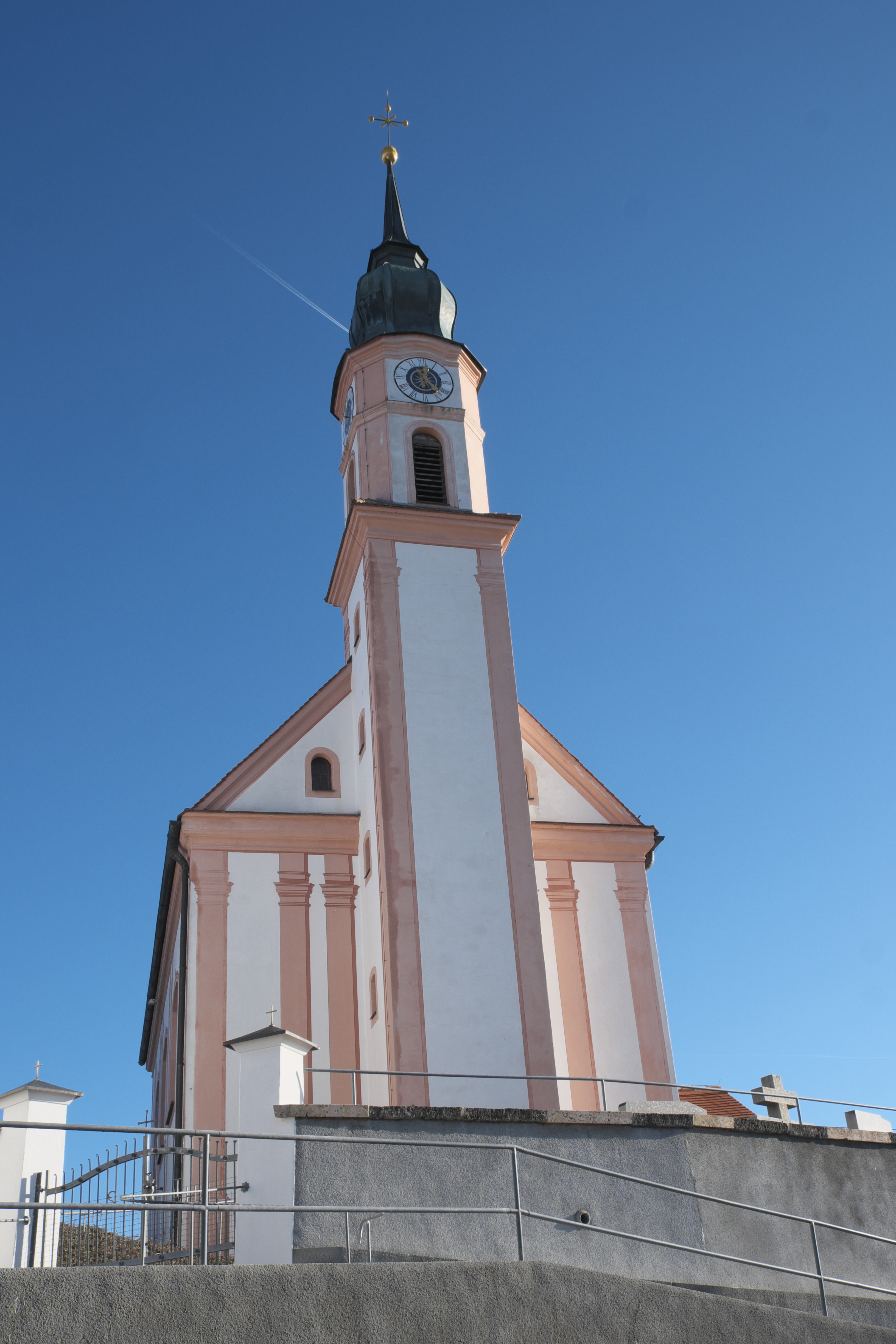 Katholische Filialkirche St. Laurentius in Pflugdorf (Vilgertshofen) im oberbayerischen Landkreis Landsberg am Lech (Bayern/Deutschland)